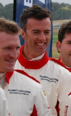 Nick Green